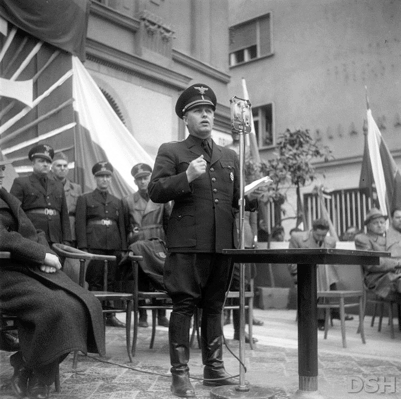 Alexander Mach (1902 – 1980), politik, hlavný veliteľ Hlinkovej gardy, podpredseda vlády a minister vnútra v období vojnovej Slovenskej republiky (1939-1945). Za zločiny proti ľudskosti, roku 1947 odsúdený na 30 rokov väzenia. Digitalizácia fotografie z dobovej tlače.